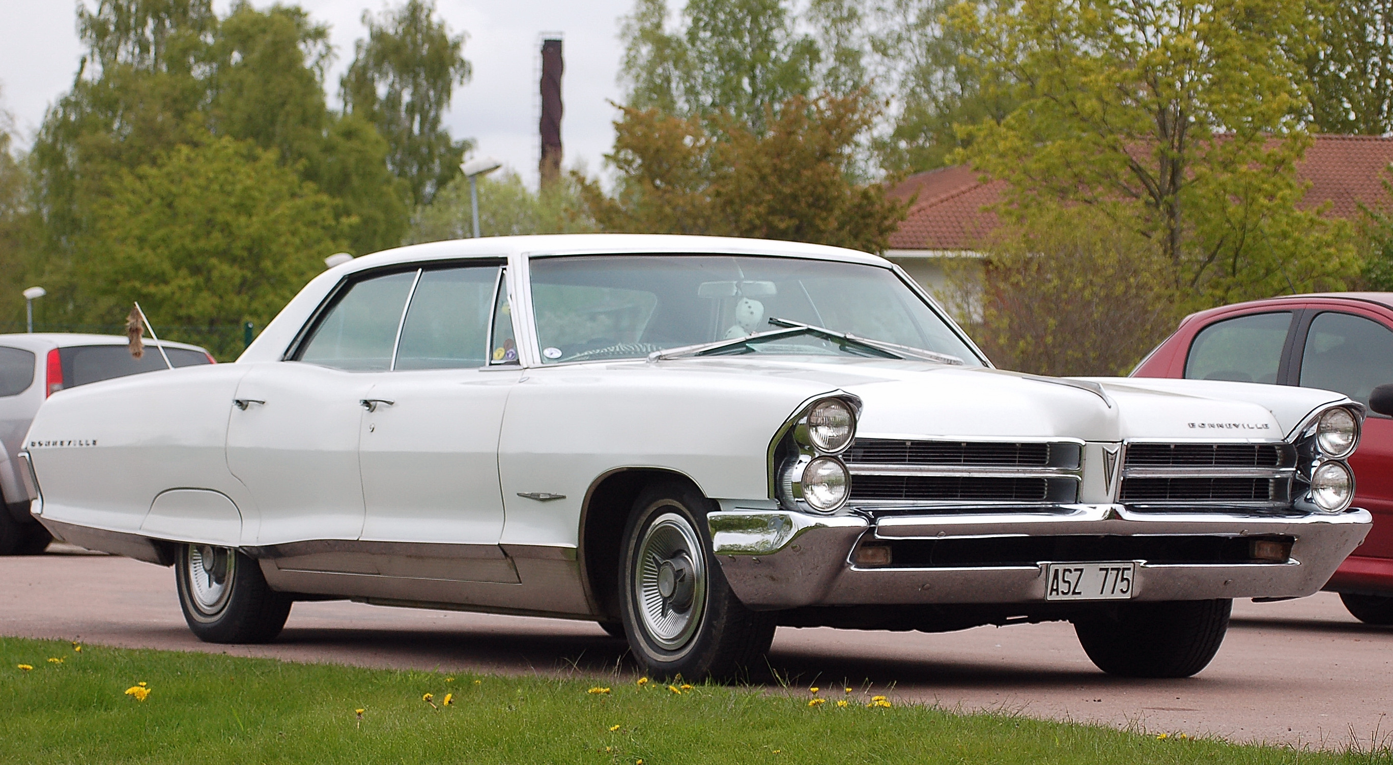 Registreringsnummer: ASZ-775 Fabrikat: PONTIAC BONNEVILLE Färg: VIT Fordonsslag: PB Fordonsår: 1965 Identifieringsnummer: 262395E213346 I trafik första gången i Sverige: 2008-04-04 Kaross: Täckt Växellåda: MANUELL Antal passagerare, max: 5 Tjänstevikt (faktiskt vikt), kg: 2080 Totalvikt, kg: 2490 Max lastvikt, kg: 410 Längd, mm: 5650 Bredd, mm: 2020 Drivmedel 1: BENSIN Tankvolym, liter: 100 Motoreffekt, kW: 245,0